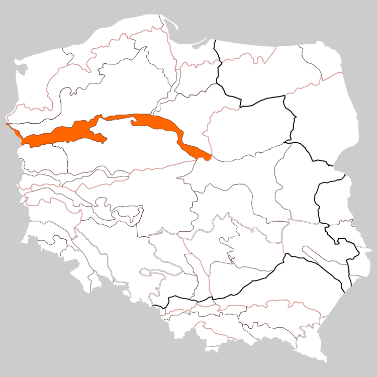 Physico-geographical regionalization of Poland Macroregion 315.3 Toruń-Eberswalde Glacial Valley Regionalizacja fizycznogeograficzna Polski Makroregion 315.3 Pradolina Toruńsko-Eberswaldzka